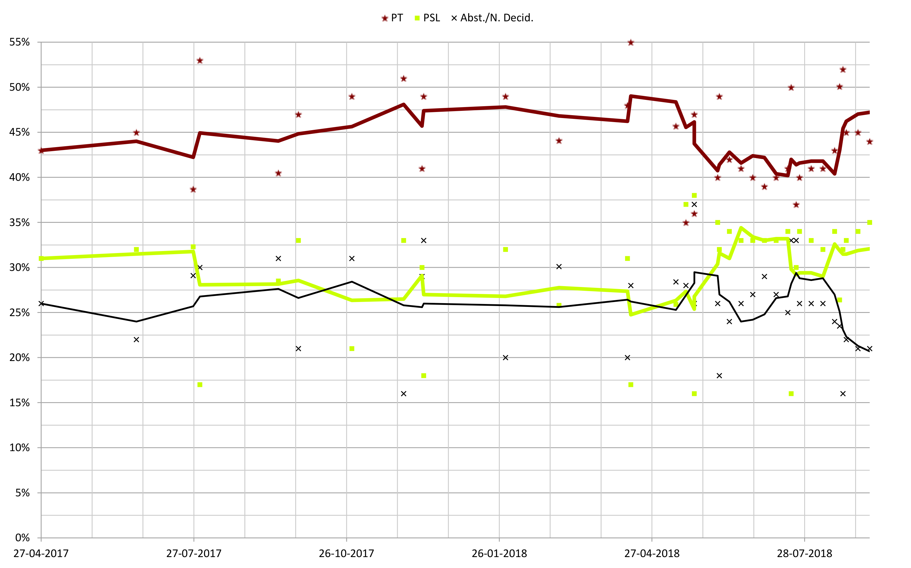 Graph showing 5 poll average trend lines of Brazilian opinion polls for the second round of presidential election from April 2017 to the most recent one. Based on data at